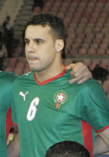 Elamin Erbate lors du match Maroc-République tchèque 11 février 2009